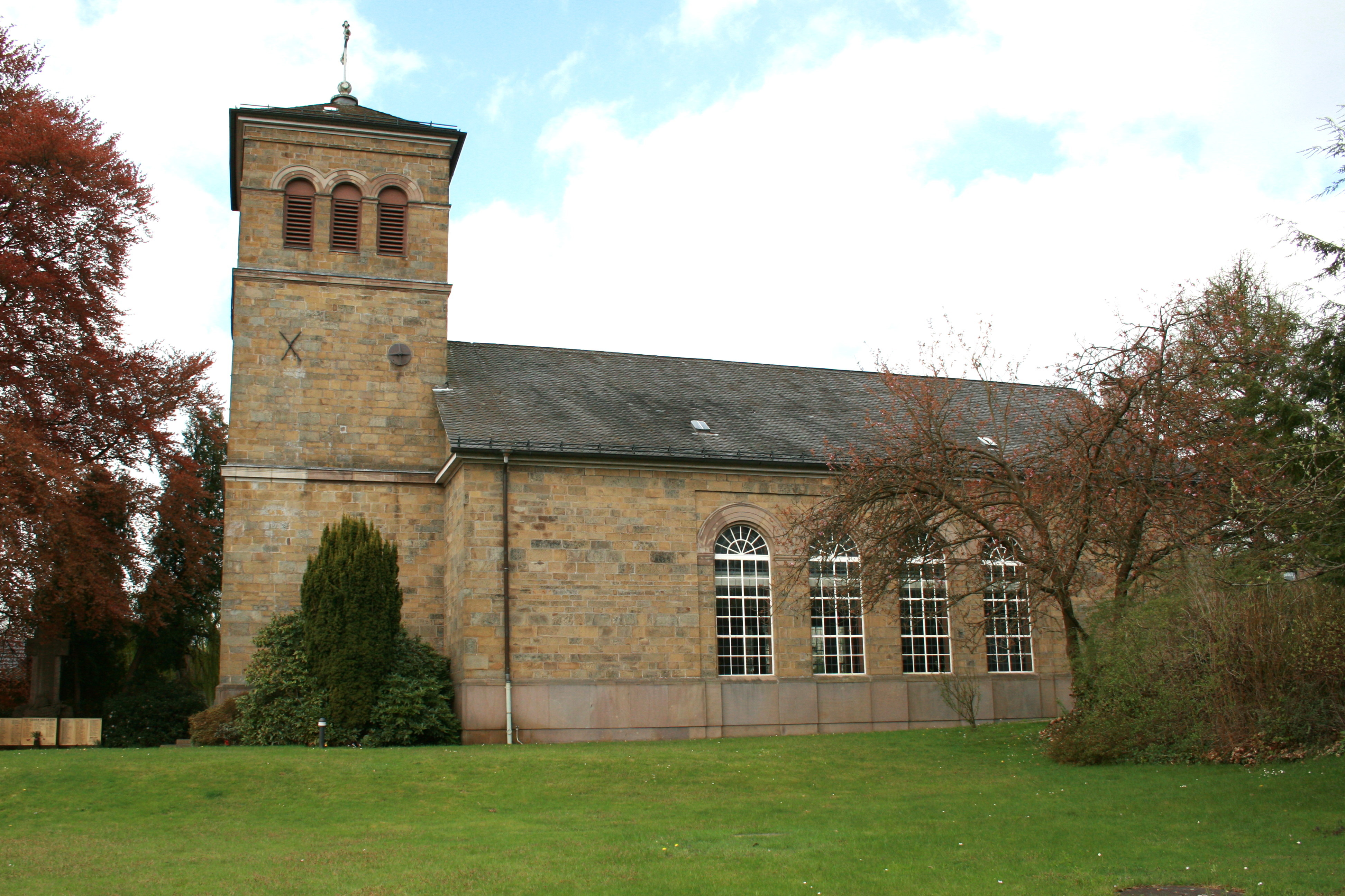 Evangelische Kirche in Wipperfürth-Klaswipper